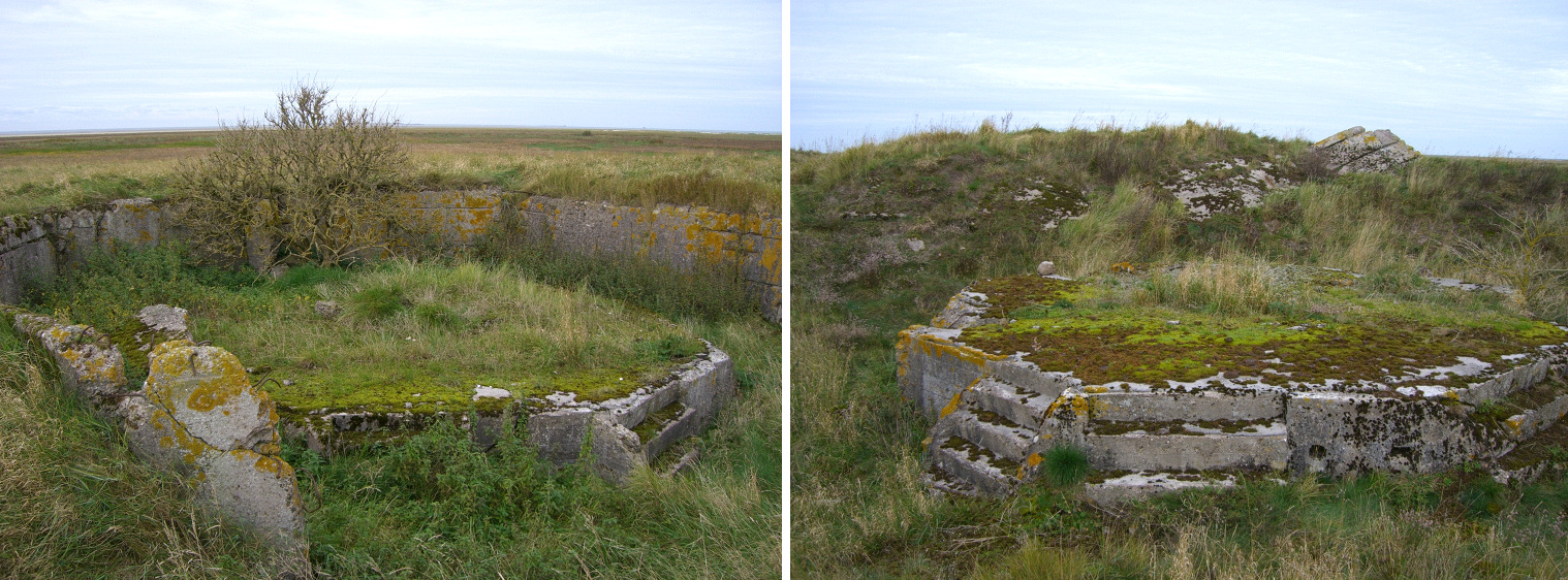 Ehemalige Flakstellungen des Zweiten Weltkriegs auf Mellum